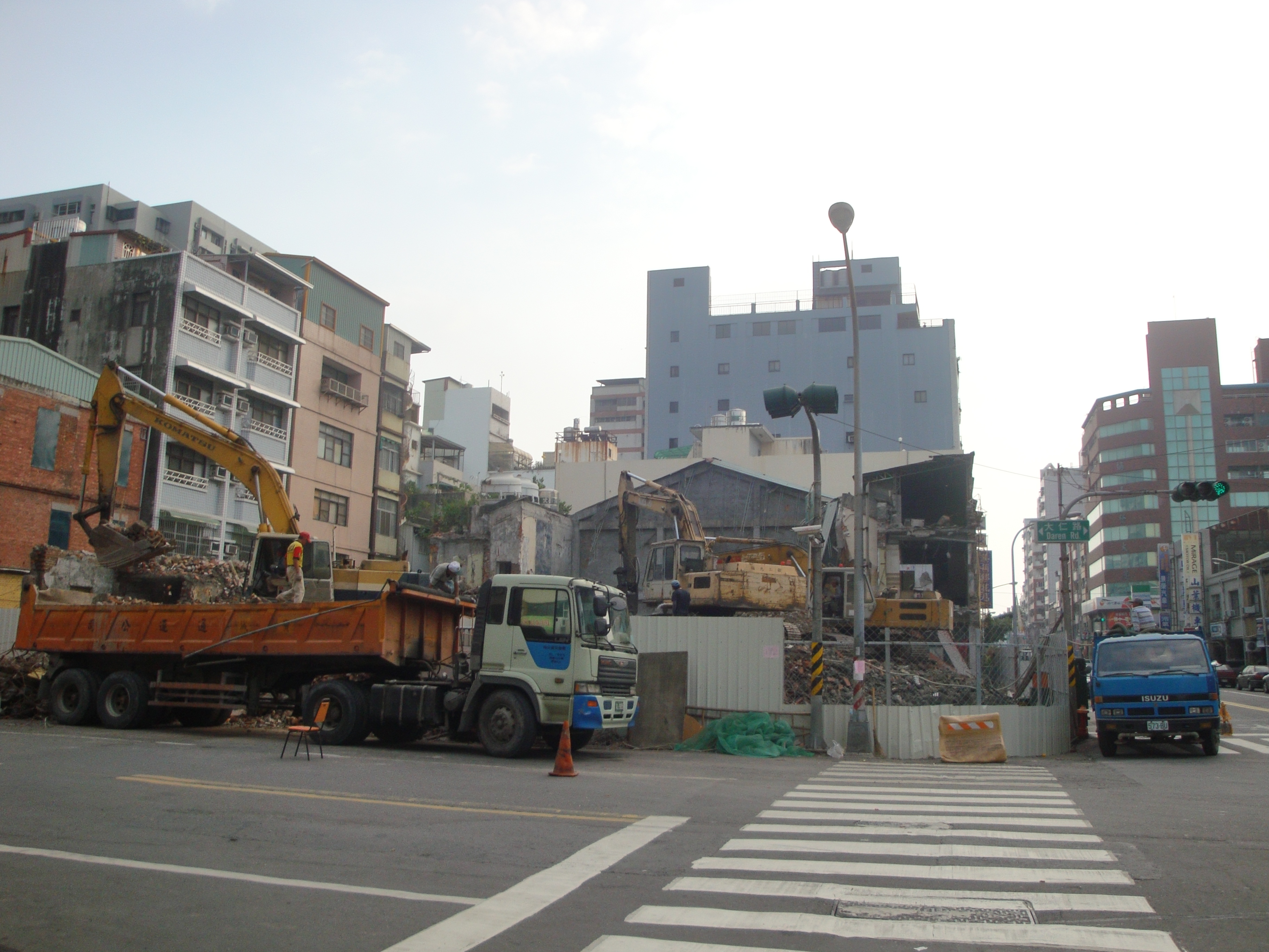 中文（台灣）: 大舞台戲院拆除後。